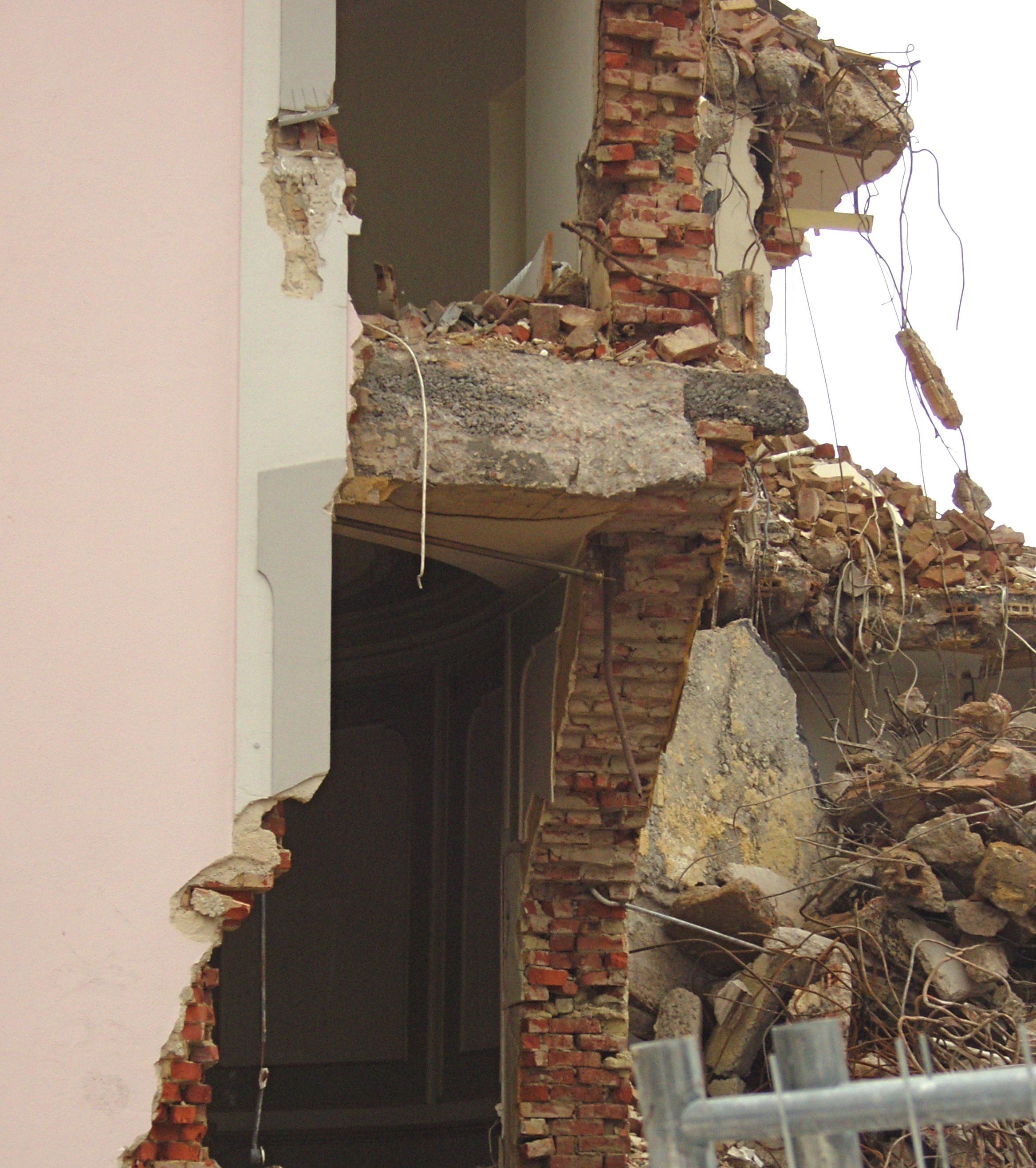 Das 1923 errichtete Henschelhaus des Architekten Karl Wittrock in Kassel an der Kreuzung Neue Fahrt / Kölnische Straße. Ansicht der historischen Raumdekoration während der Abbrucharbeiten im Mai 2010.